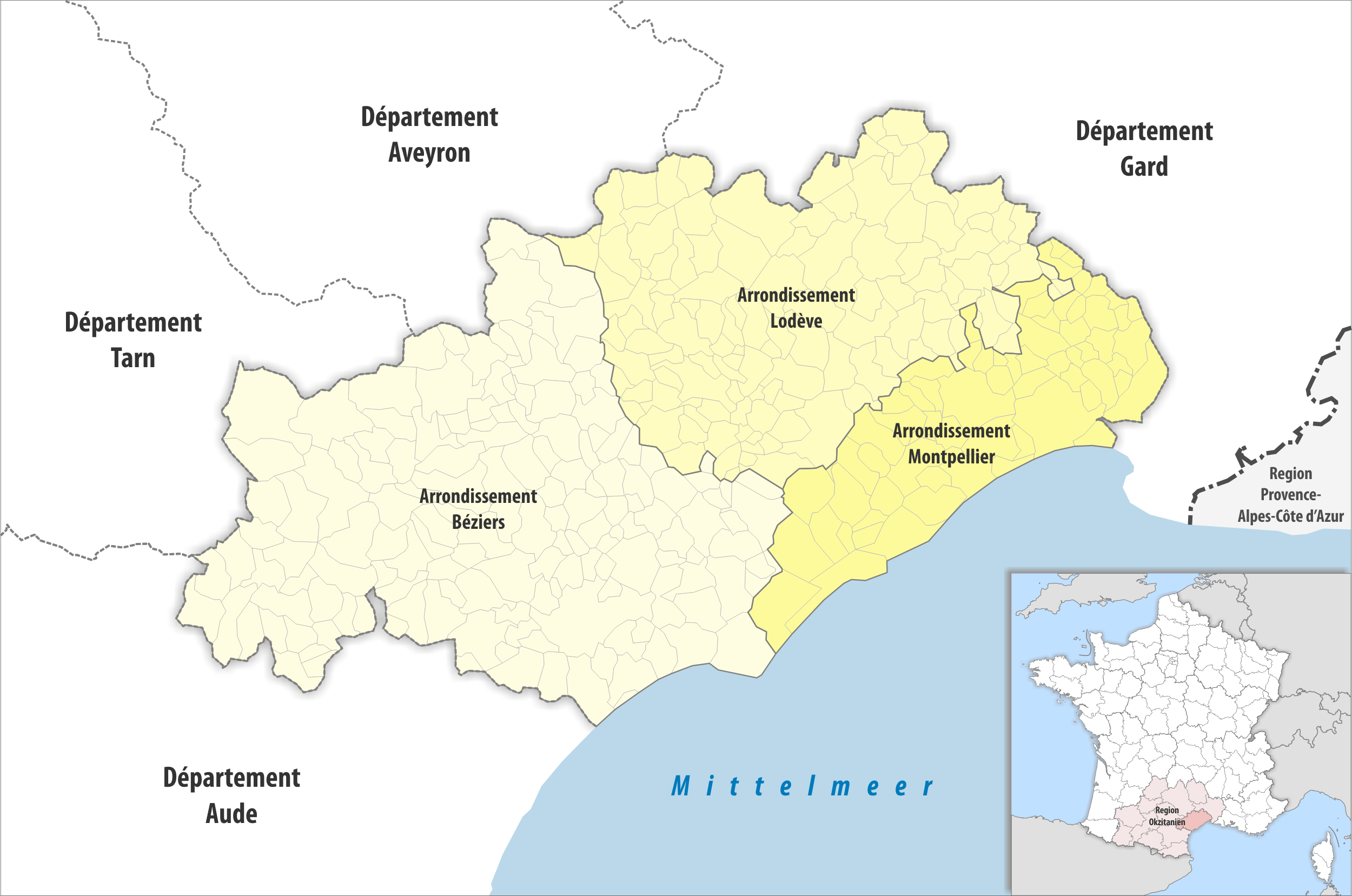 Gemeinden und Arrondissemente im Departement Hérault